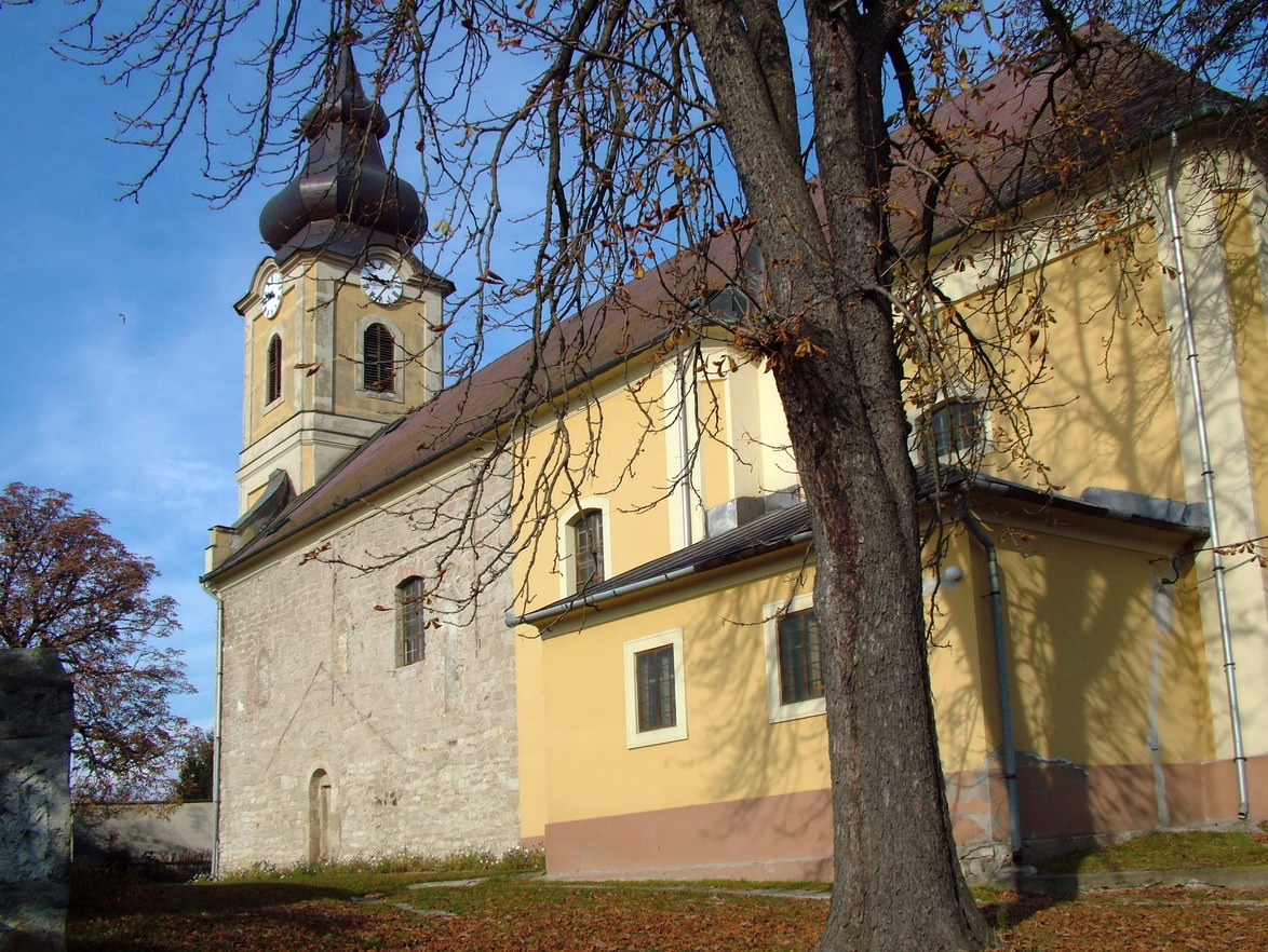 Verpelét - római katolikus templom, árpád-kori